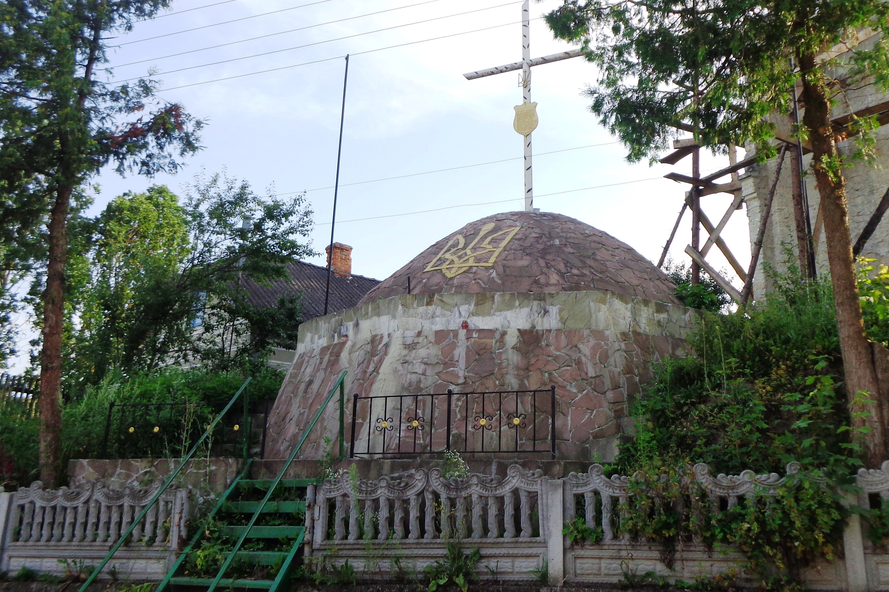 Хрест у Божиків